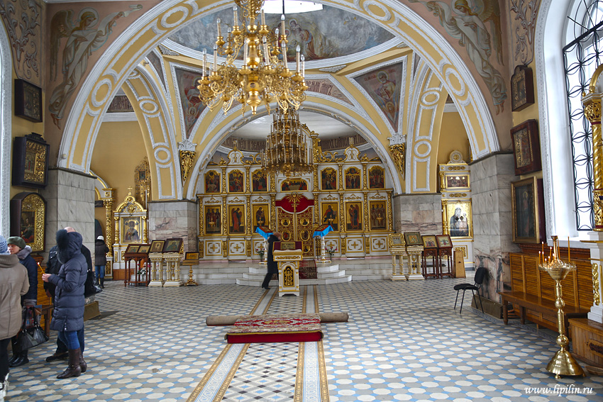 Магілёў. Сабор Трох Свяціцелей. Інтэр'ер